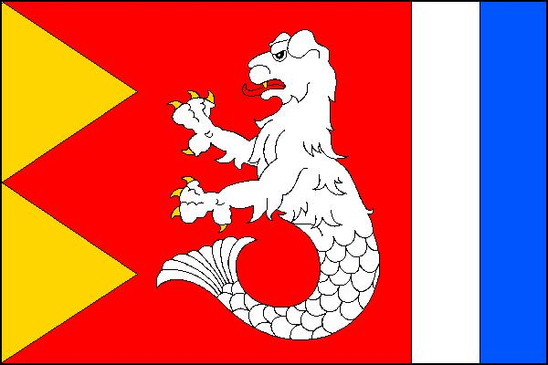 Vlajka obce Maleč